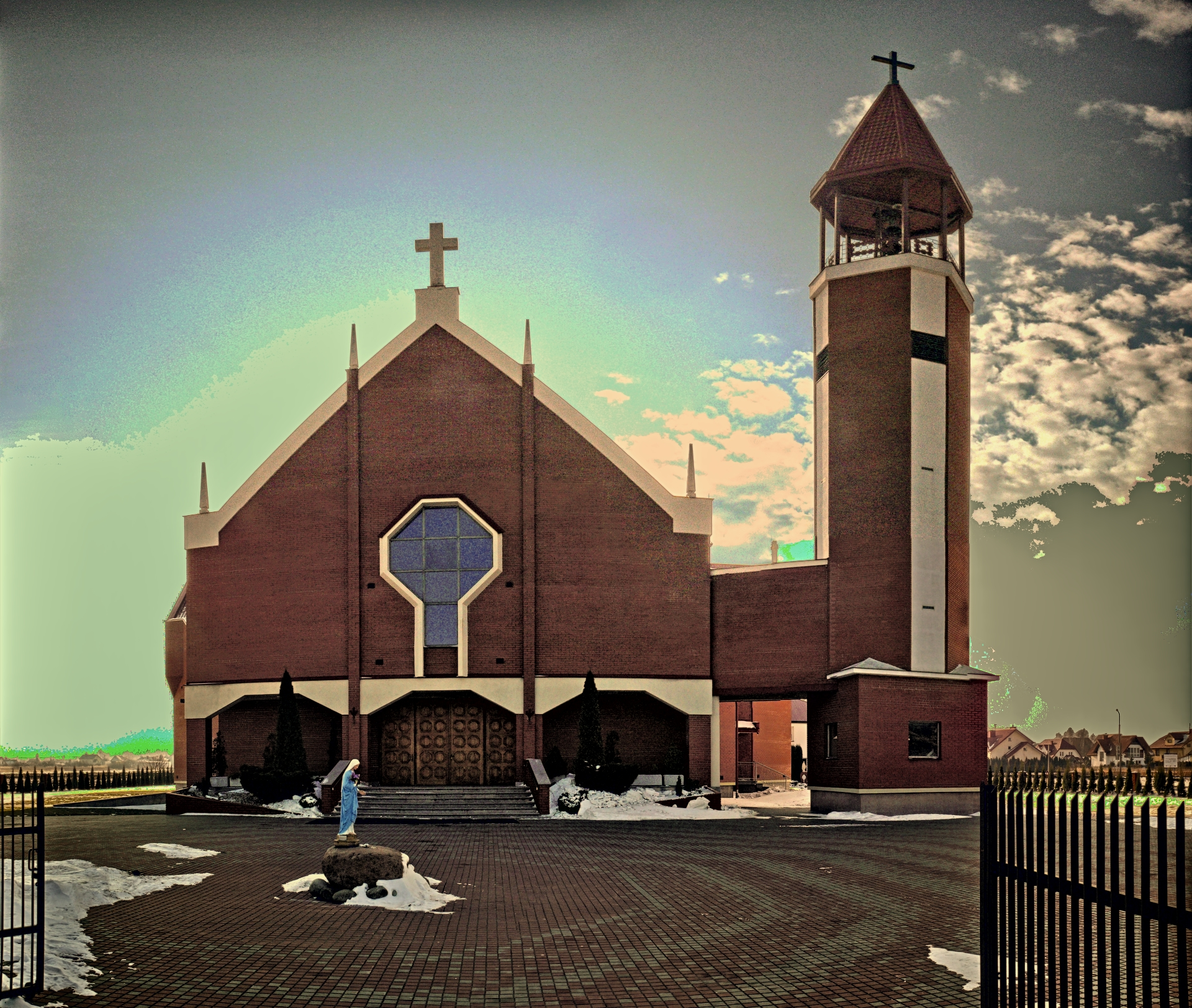 kościół parafialny p.w. Św. Brata Alberta w Łukowie, woj. lubelskie